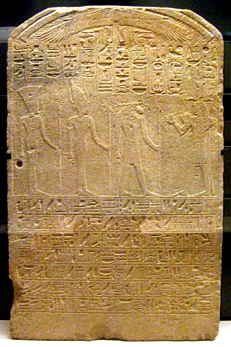 Stèle d'Amenhotep II le figurant en offrande devant les dieux d'Eléphantine. Trouvée à Amara en Nubie - XVIIIe dynastie égyptienne - Musée du Louvre.